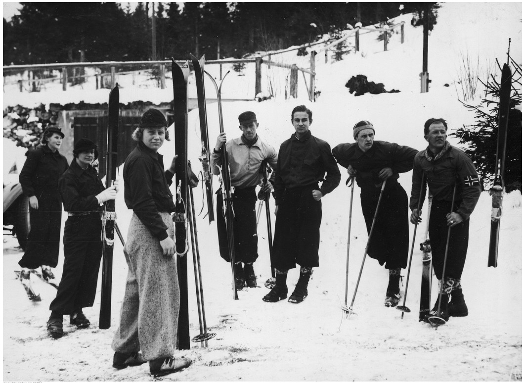 Les skieurs du groupe de Norvège. Debout de droite: Birger Ruud, Johann Kvernberg, Sverre Lassen-Urdahal, Alf Konningen, Per Fossum, Laila Schou Nilsen, Eli Pettersen, Johanne Dybwad.